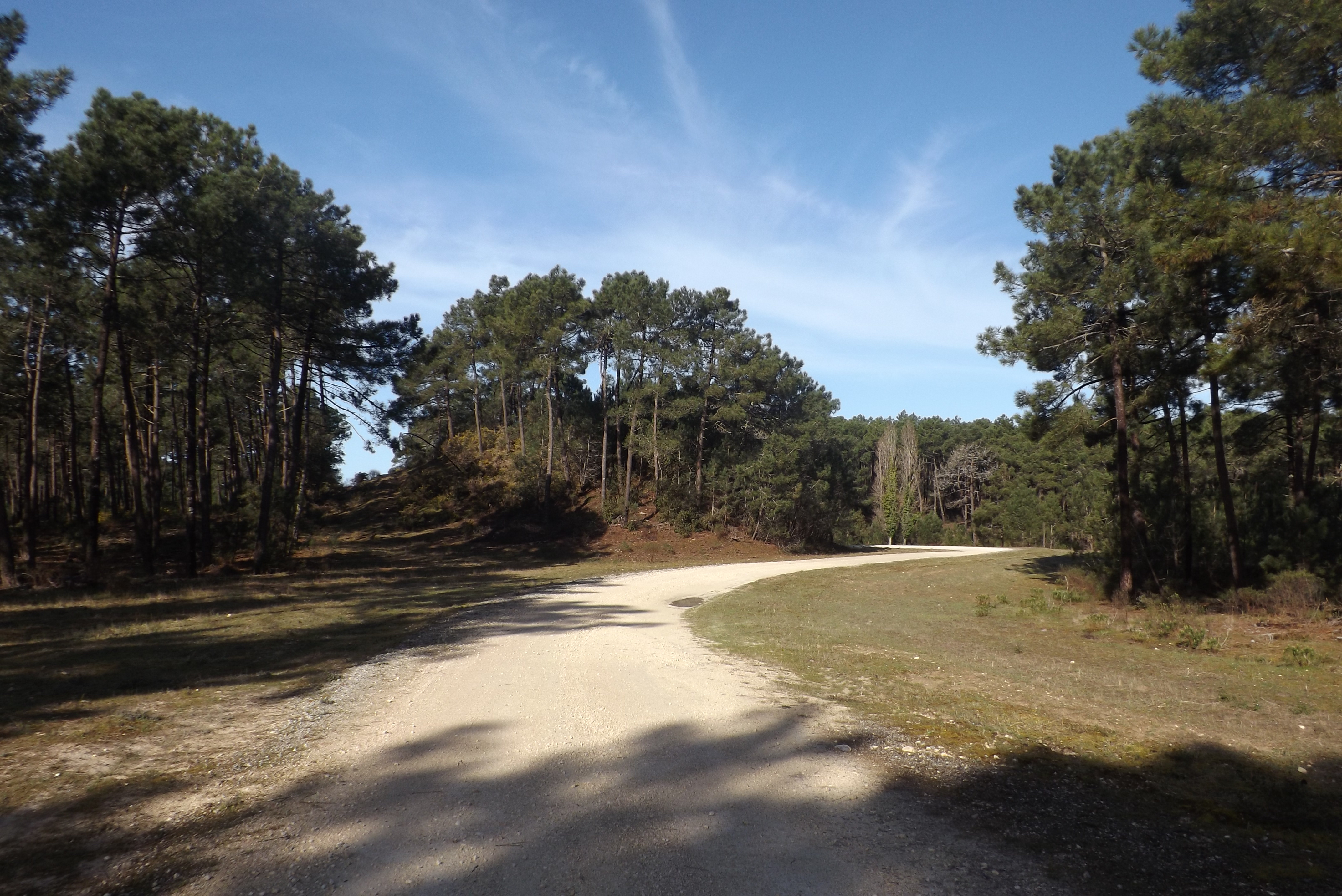 Le tumulus de la Chapelle de Buze